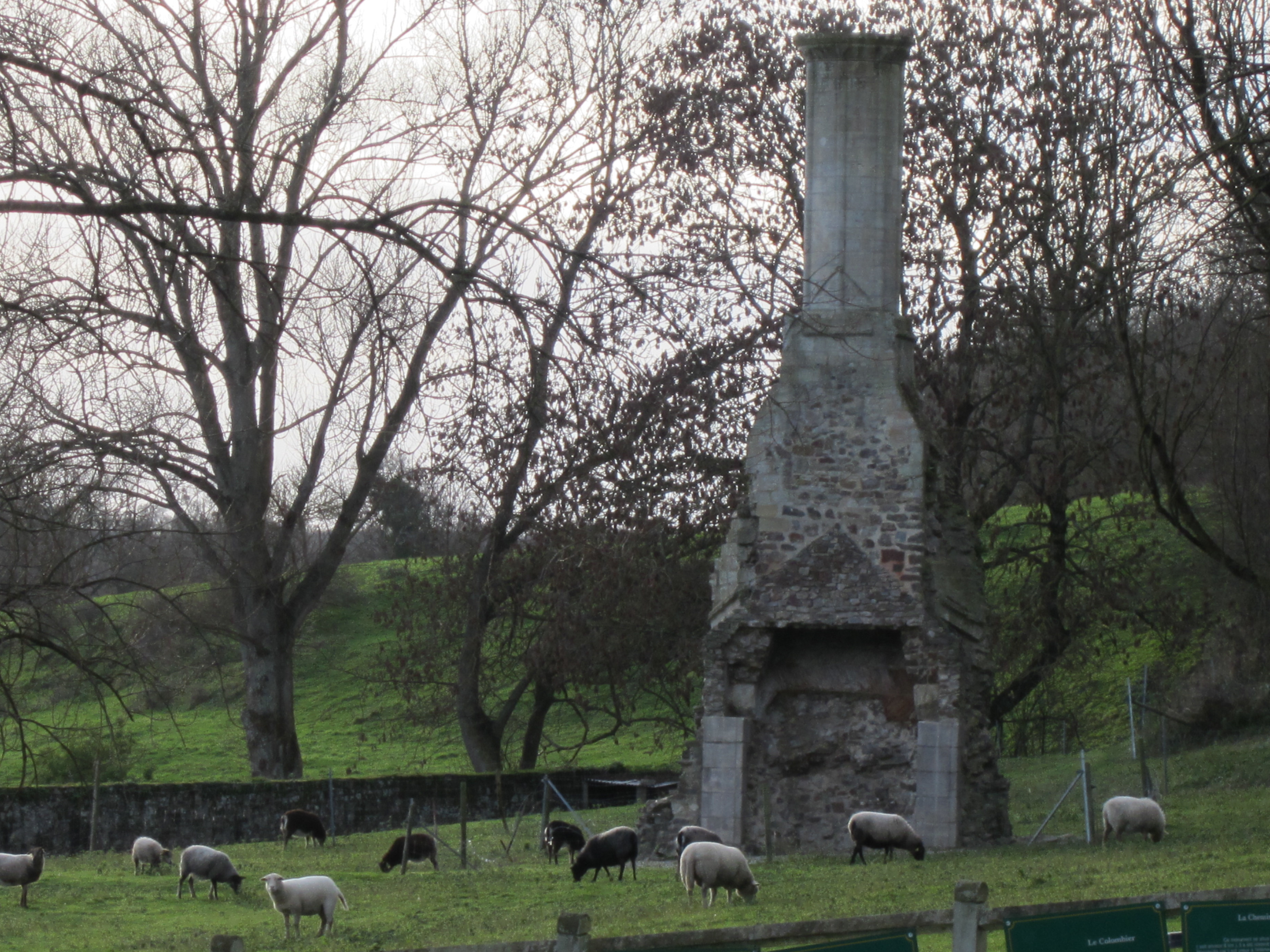 Grande cheminée de Quinéville, Manche